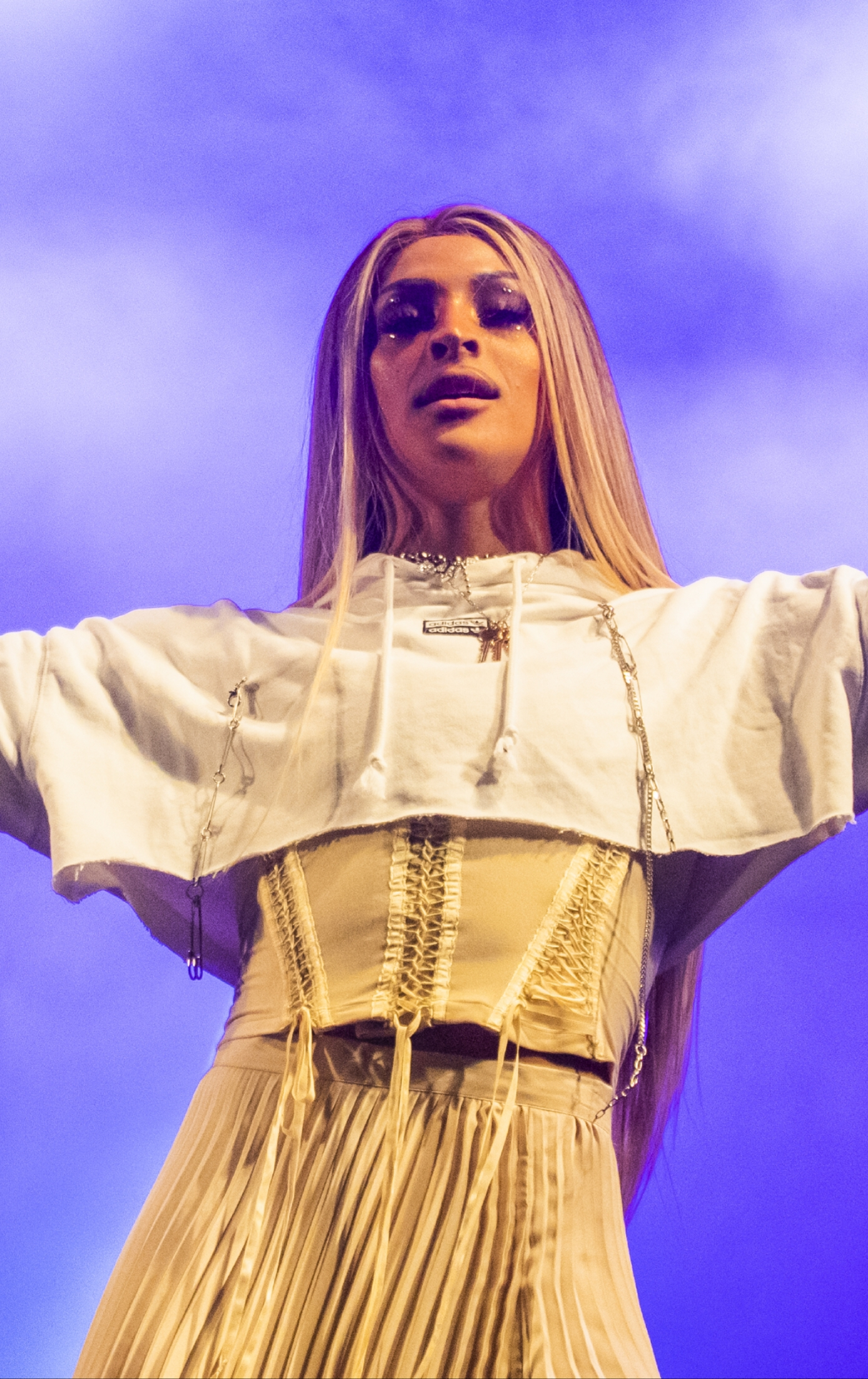 Pabllo Vittar - Festival Sensacional 2020 - Photo by: Bruno Figueiredo